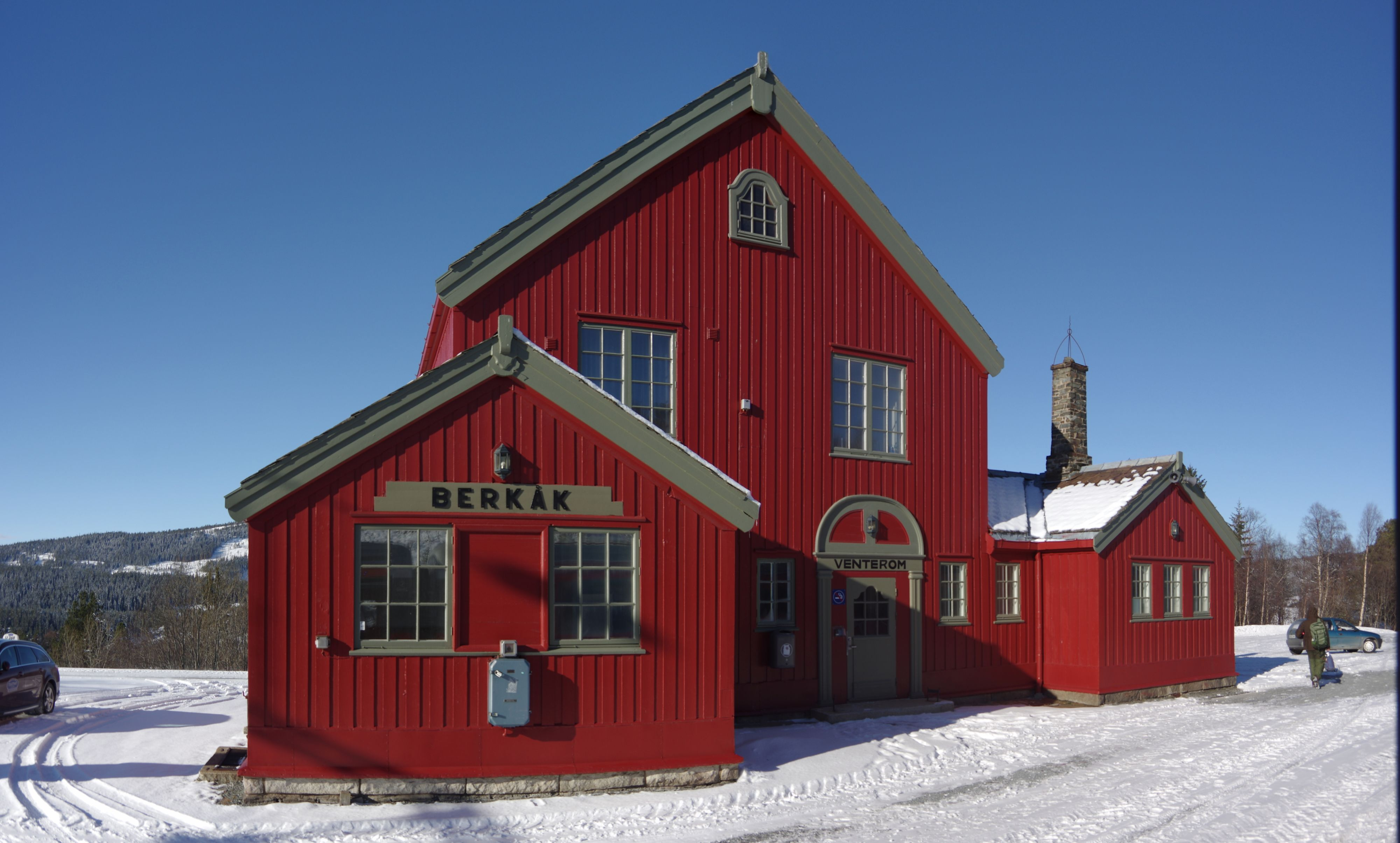 Berkåk, ein Dorf in der Gemeinde Rennebu in Norwegen. Am Bahnhof hält die Dovrebanen.